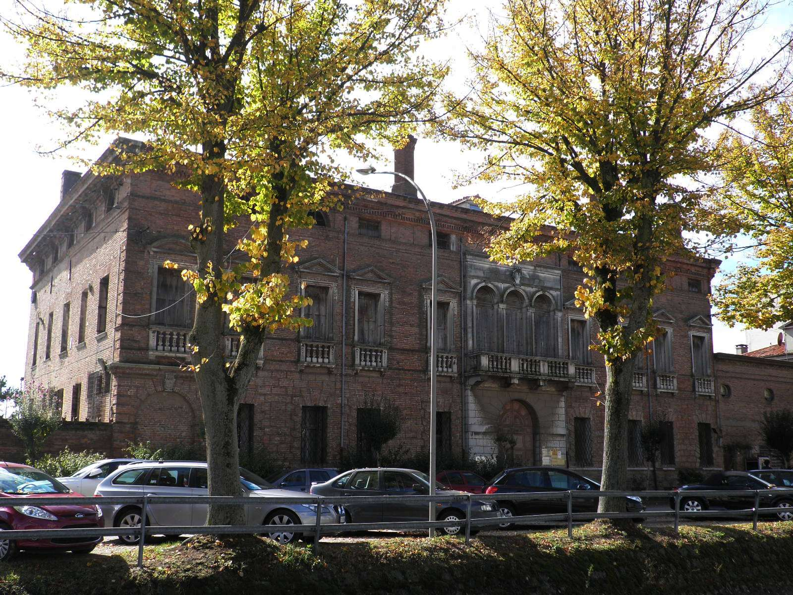 Palazzo Perolari-Malmignati a Lendinara (Rovigo).